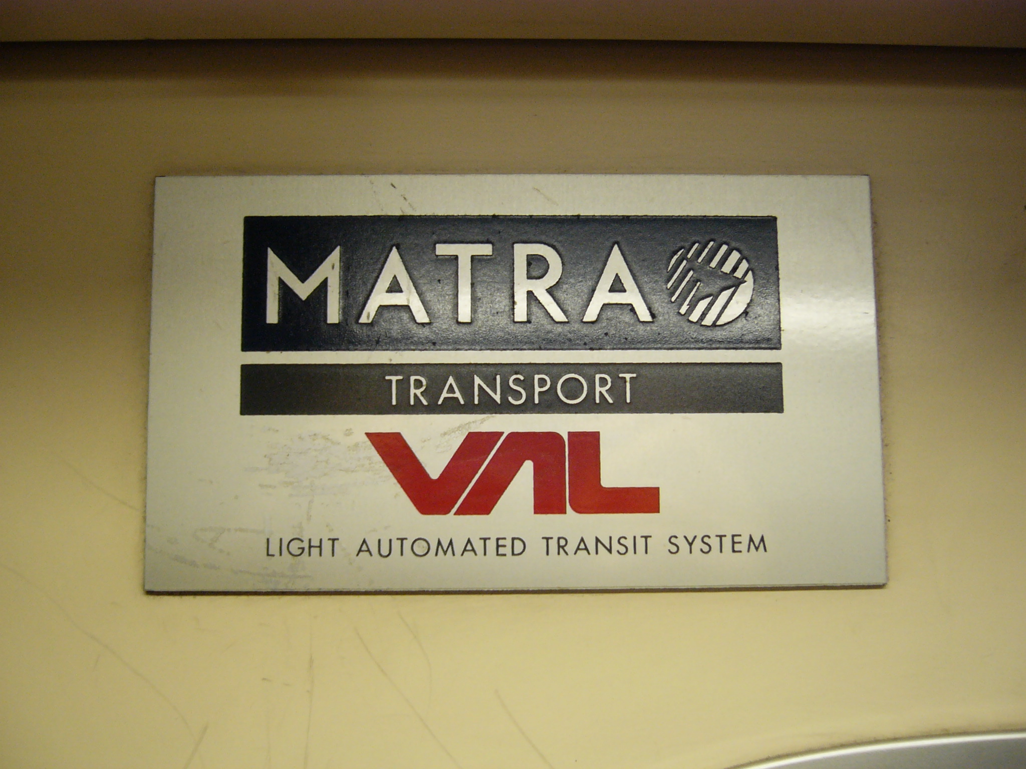 台北捷運VAL256型電聯車內的Matra VAL銘板